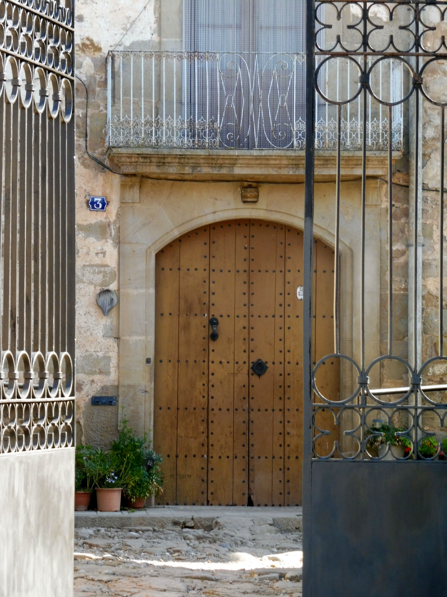 Ca n'Estruc de Sorba (Montmajor): el portal